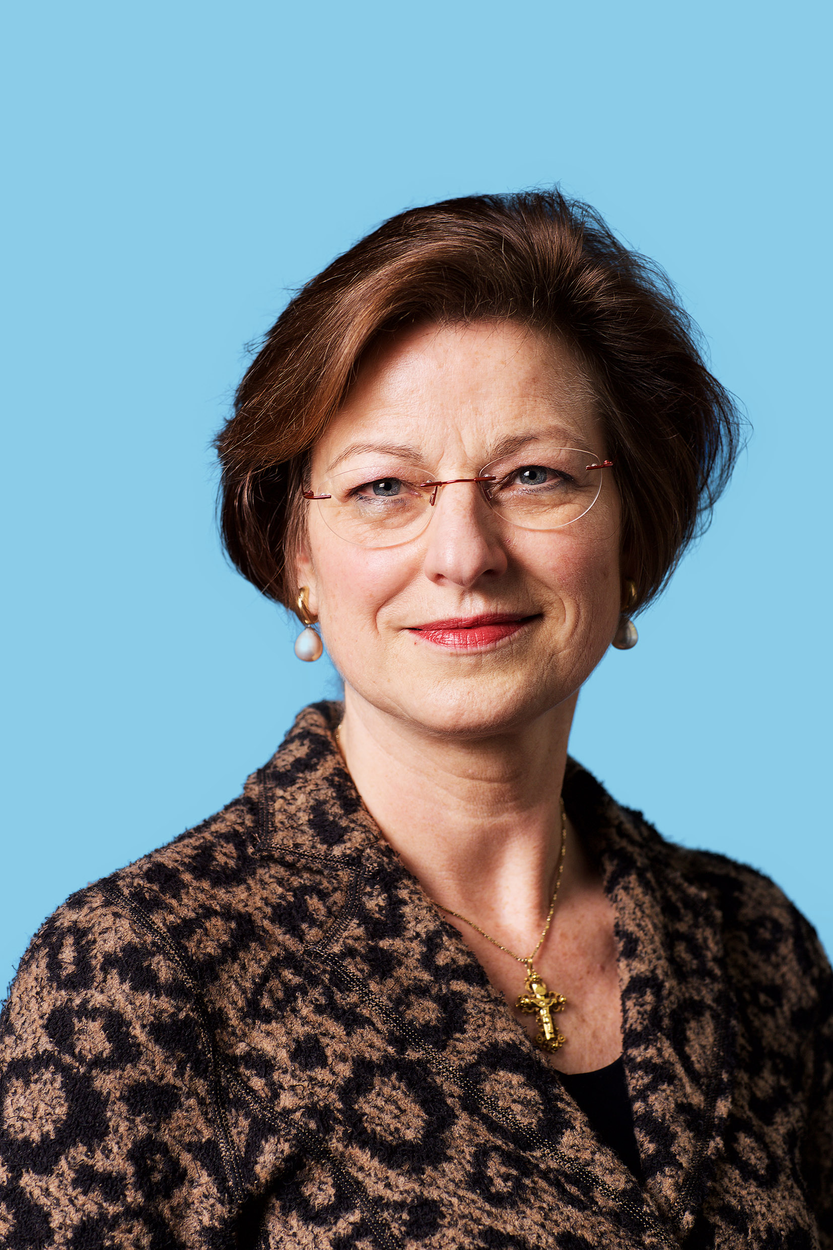 13 februari 2016. Tweede Kamerlid voor de Partij van de Arbeid. Foto: Lex Draijer.